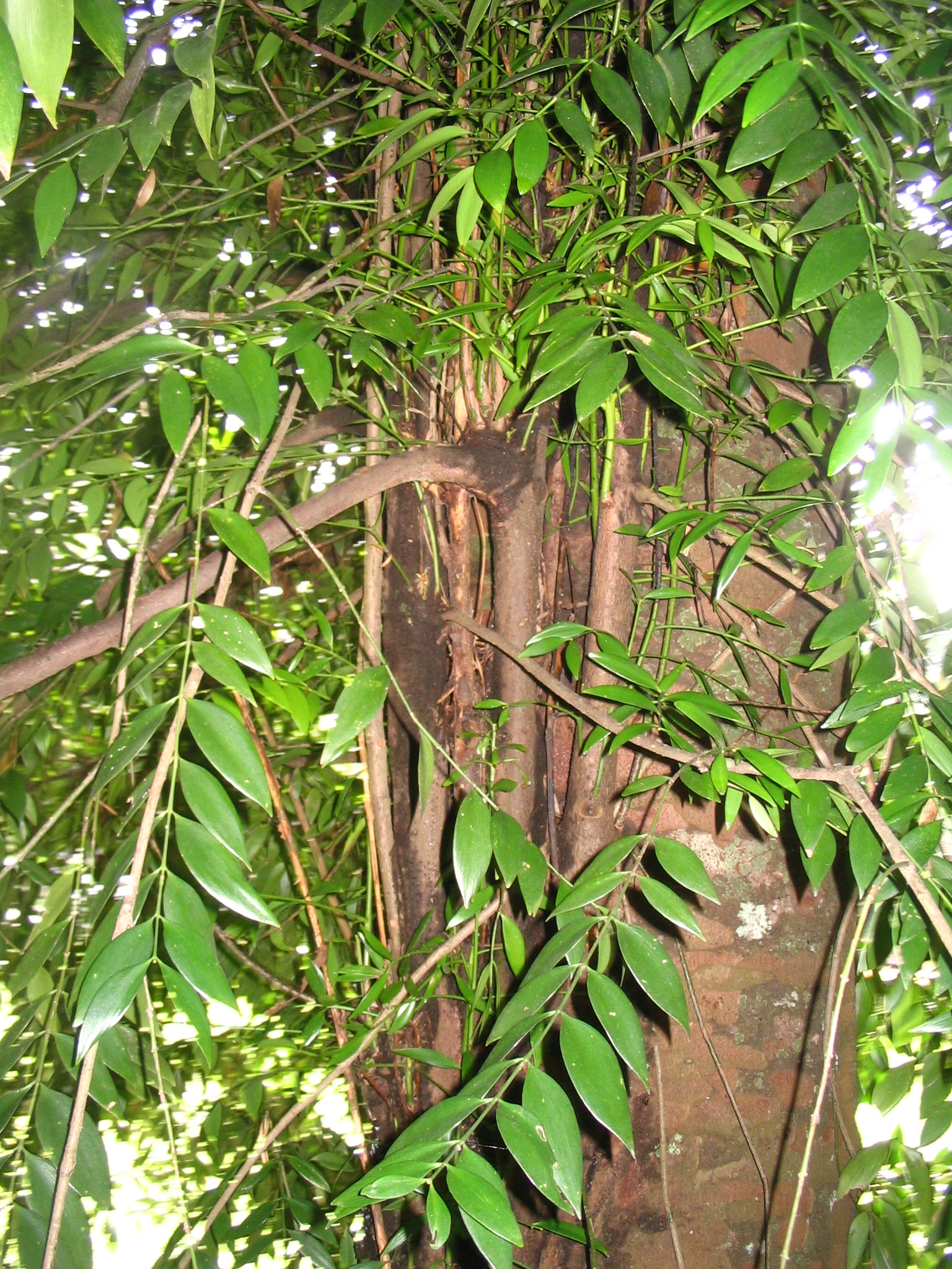 Agathis borneensis - rejets à la base du tronc . Forest Research Institute of Malaysia - Kepong - malaisie